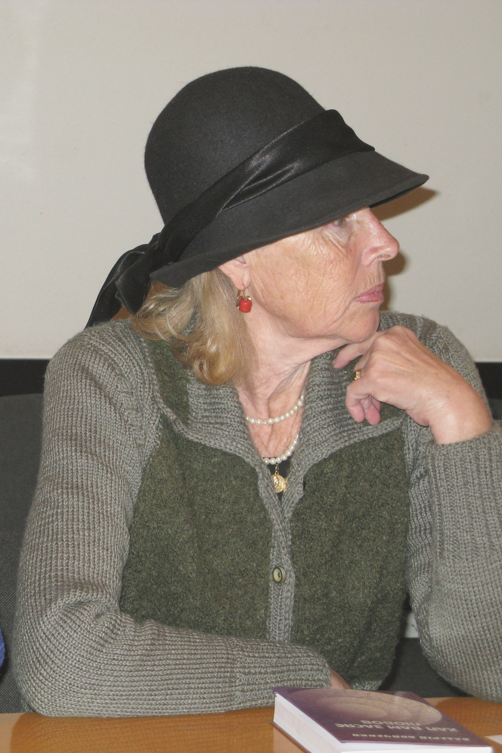 Перекладач і педагог Олена Поманська